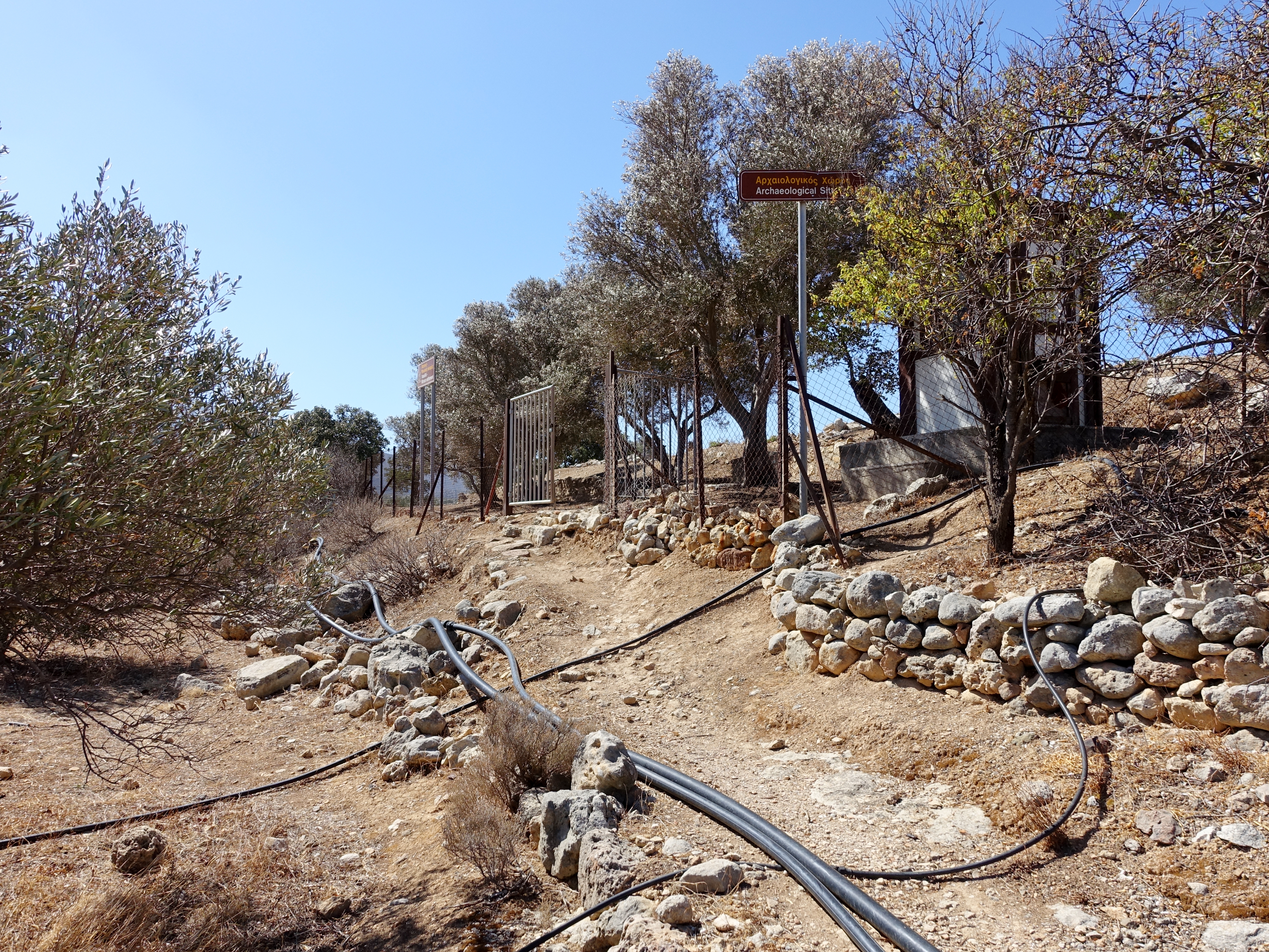 Eingang zur Ausgrabungsstätte Vassiliki (Βασιλική), Gemeinde Ierapetra, Kreta, Griechenland